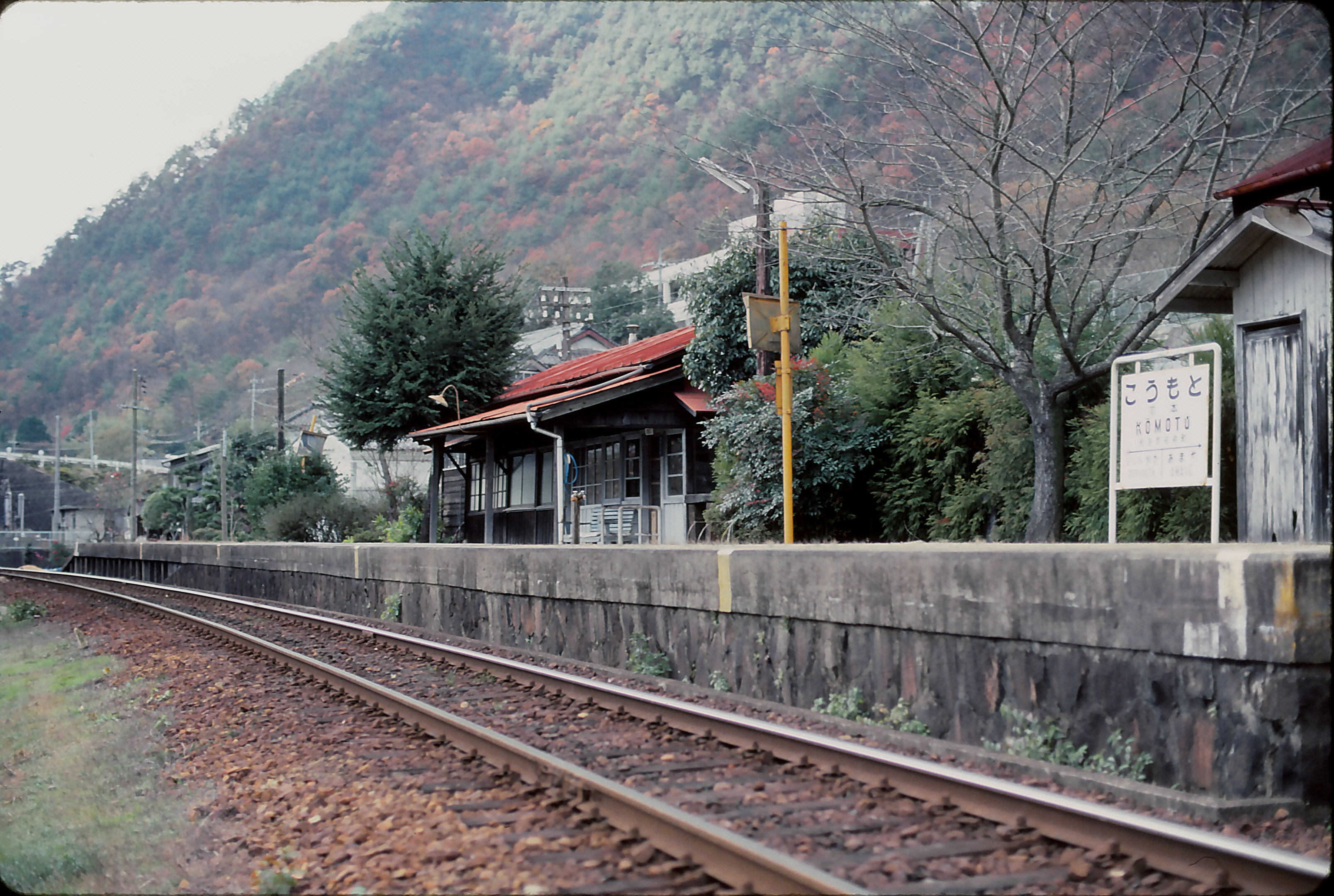 同和鉱業片上鉄道 河本駅